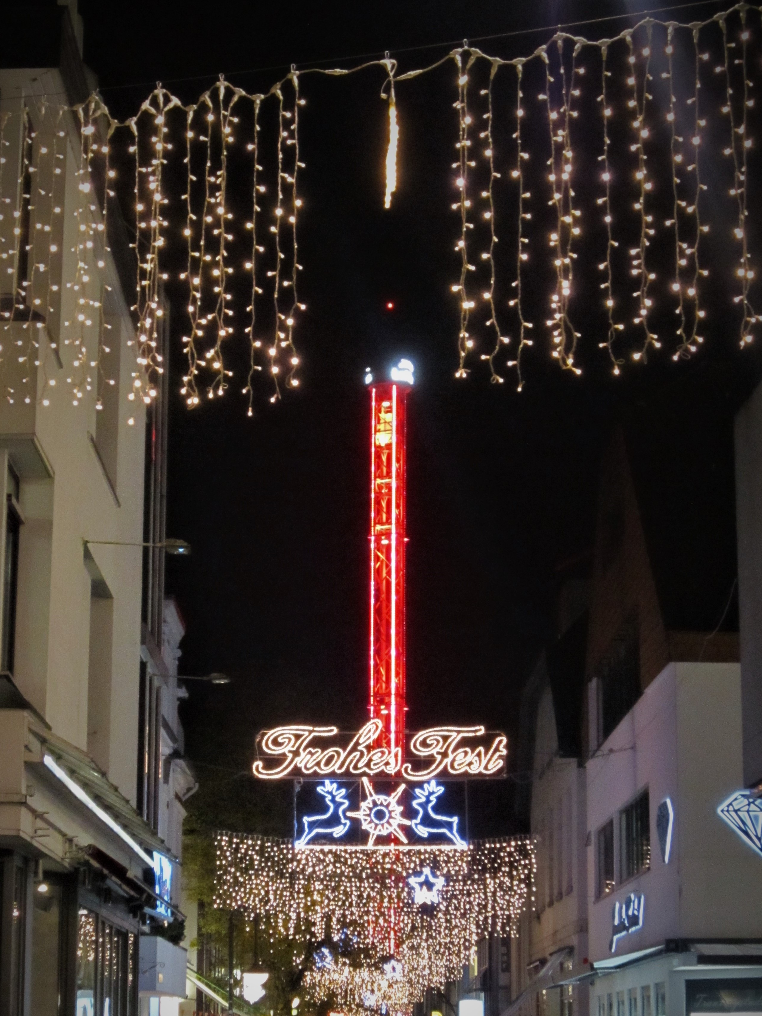 Dépendence des Lambertimarkts 2019 in Oldenburg (Oldb): der City Skyliner auf dem Julius-Mosen-Platz am Ende der Kurwickstraße. Die Sichtachse beginnt an der Langen Straße.